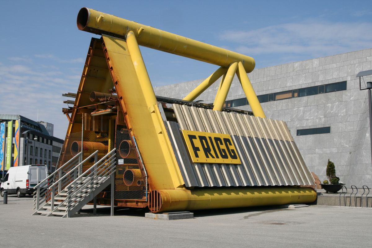 Remember Frigg, installasjon ved oljemuseumet I Stavanger